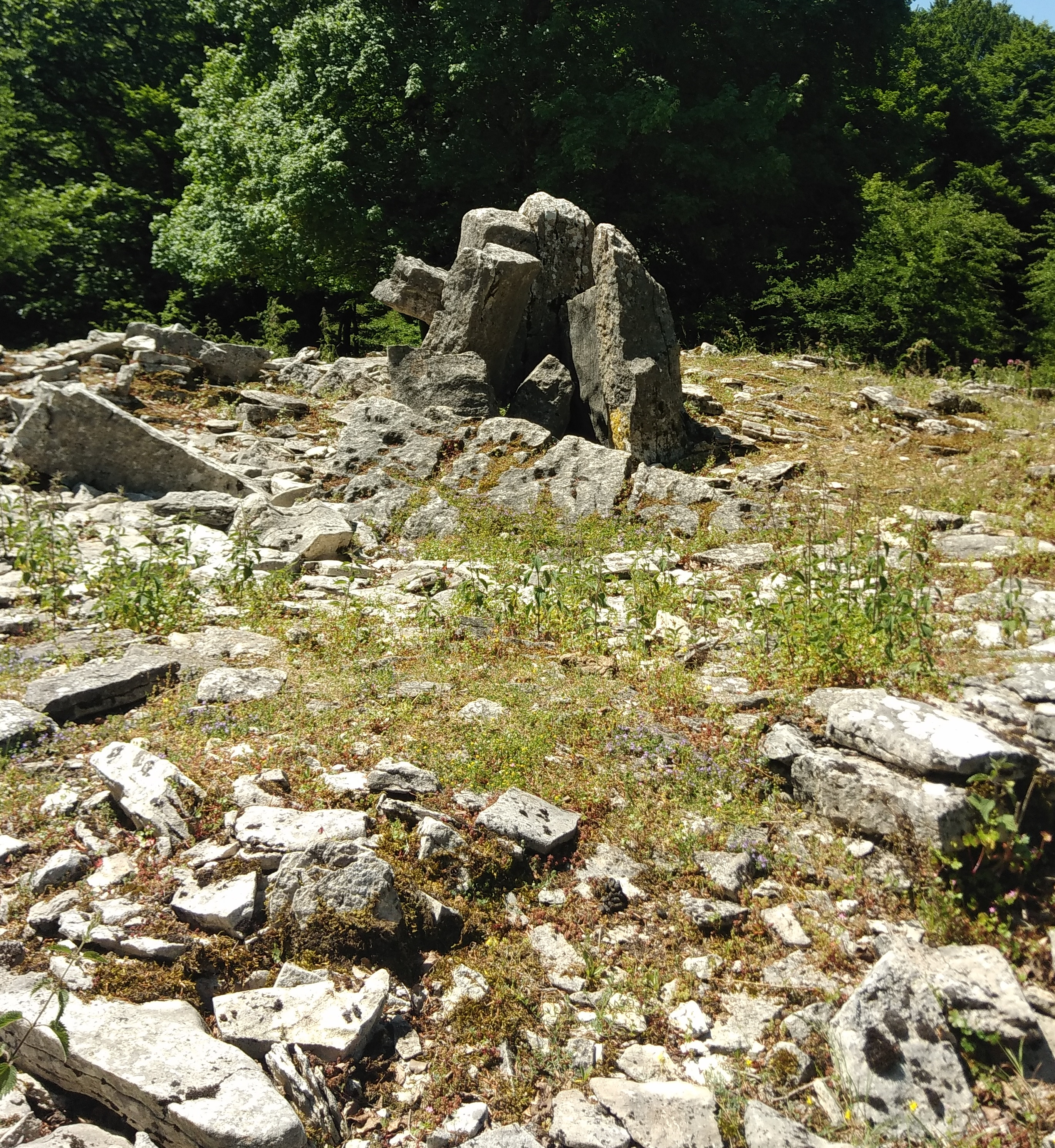 Dolmen de la Cañada en la Sierra de Urbasa, Navarra, España. Megalitismo